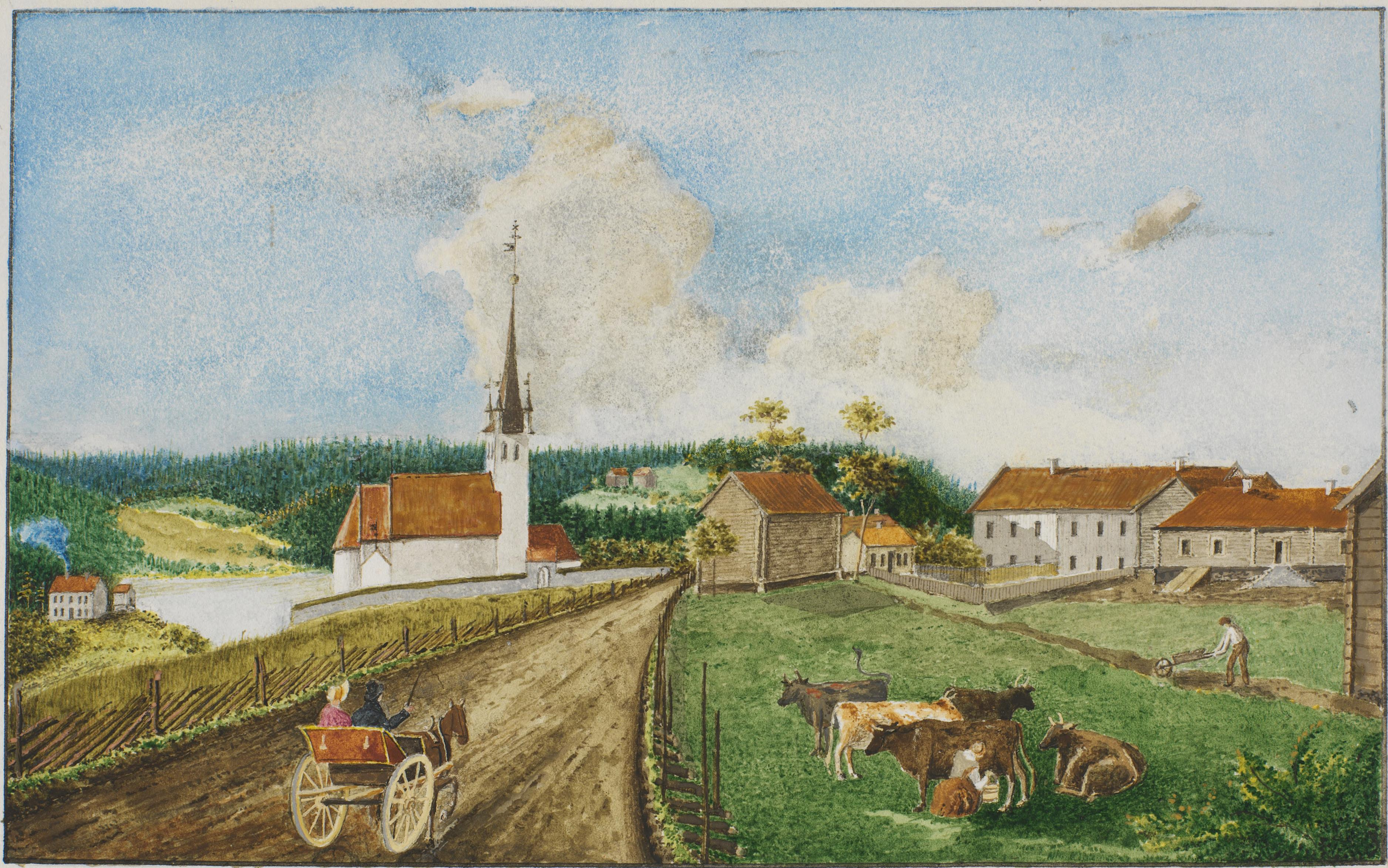 Illustrasjon hentet fra et privatarkiv i Nasjonalbiblioteket med tittelen "Nordrehaug i Ringeriget" av Peter Andreas Brandt.